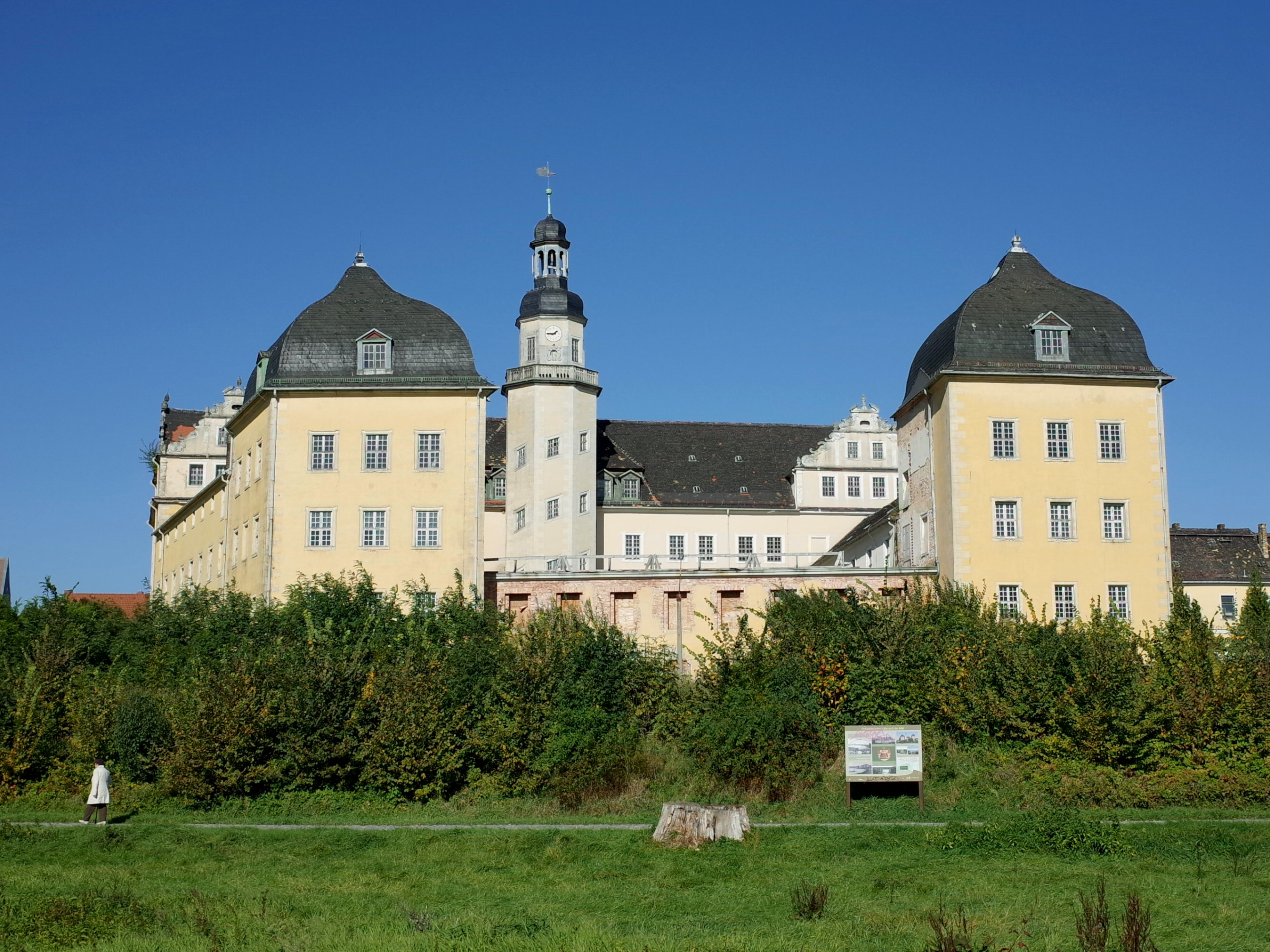 Coswig (Anhalt), Schloßstraße 44, 45, 46, Schloss Coswig. (Baudenkmal im Denkmalverzeichniss Sachsen-Anhalt, Erfassungsnummer: 094 41317 000 000 000 000 [1])